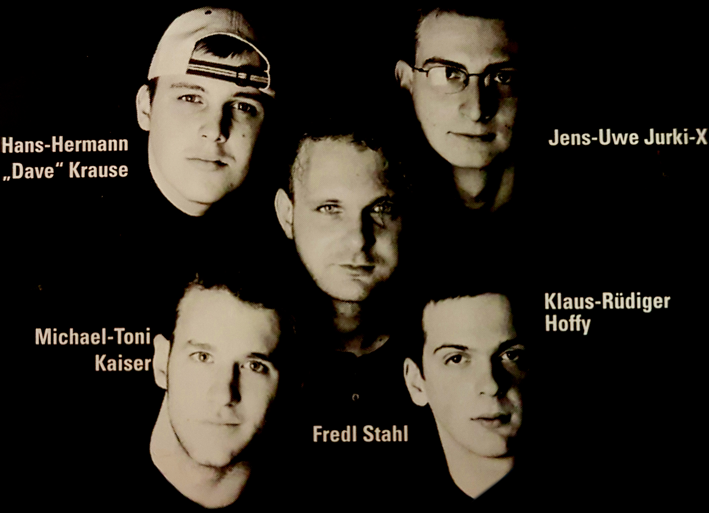 Die österreichische Rockband STAHL. Bandbesetzung (Line-Up) 1998.